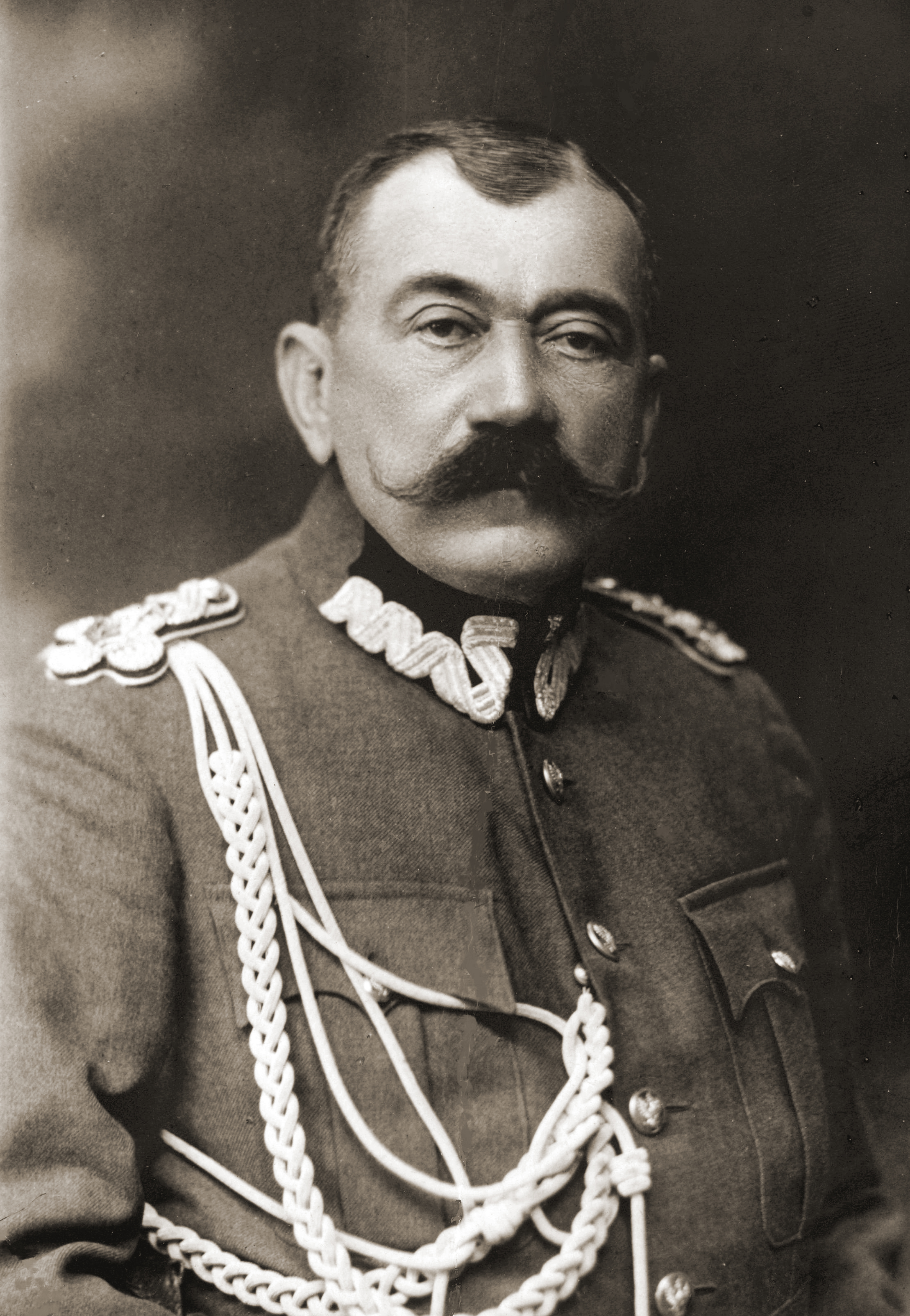 Jan Rządkowski (1860-1934), tytularny generał broni, dowódca 1 Dywizji Litewsko-Białoruskiej